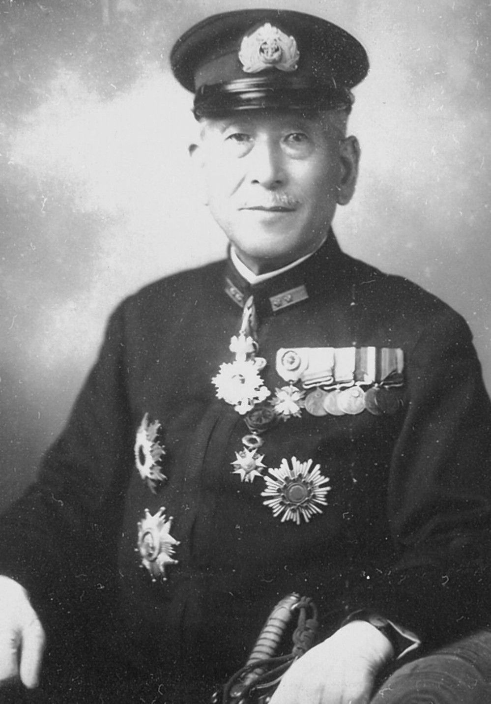 斎藤半六（日本海軍の軍人）